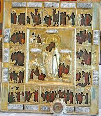 Икона